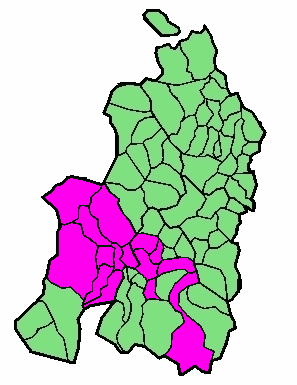 Irulegi ardoaren jatorri izendapenaren hedapena